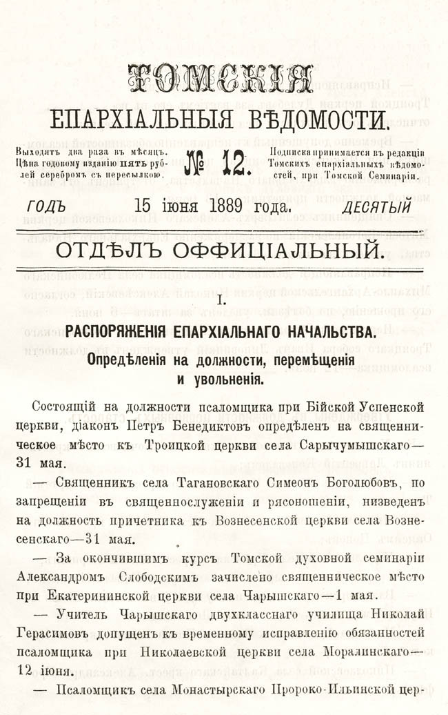 Газета "Томские епархальные ведомости". г. Томск